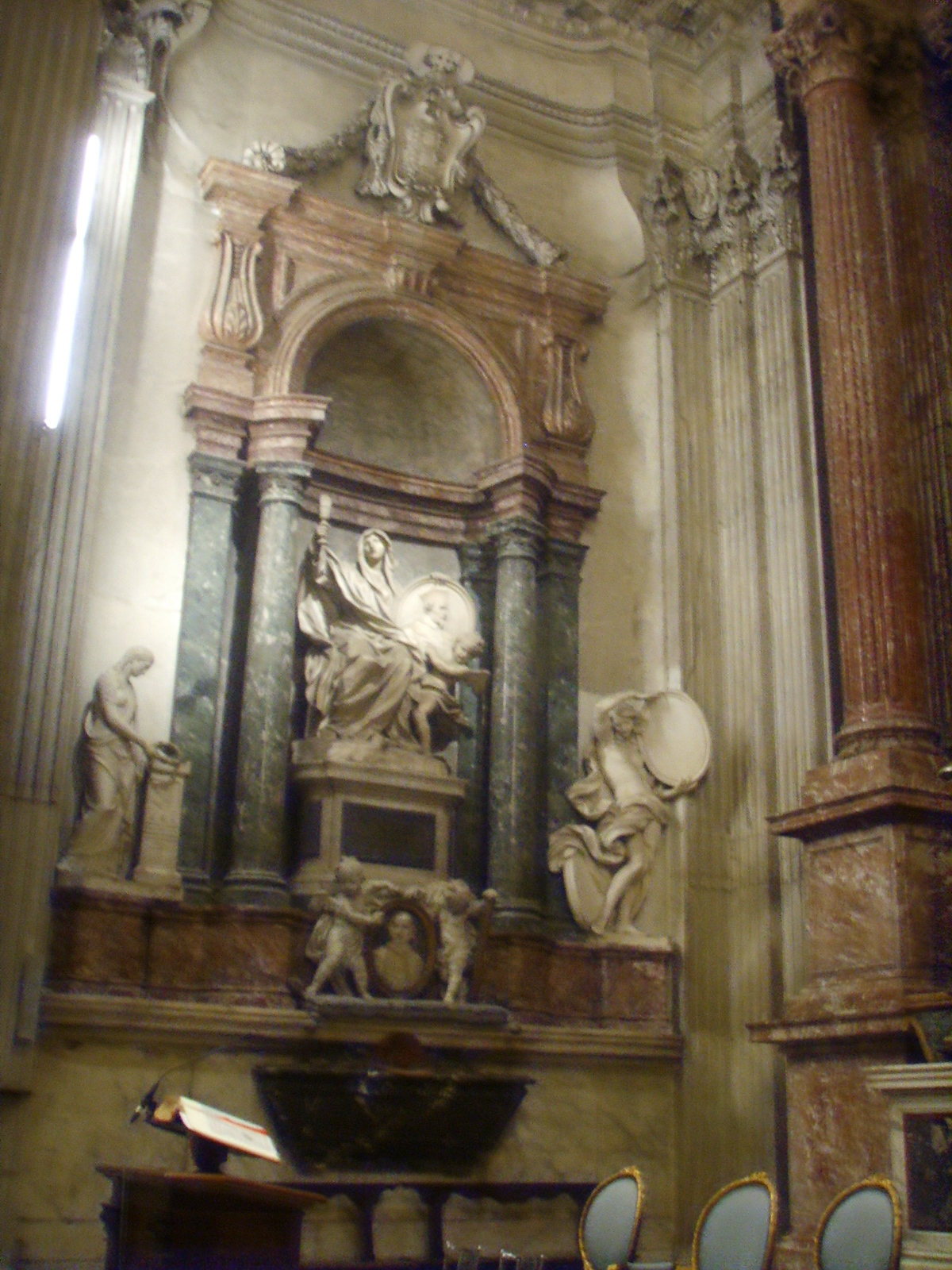 Cappella Falconieri in San Giovanni dei Fiorentini church, in Rome.